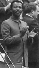 Title: Berlin, XI. SED-Parteitag Factual corrections and alternative descriptions are encouraged separately from the original description. Additionally errors can be reported at this page to inform the Bundesarchiv. Original historic description: ADN-ZB-Mittelstädt-17.4.86-pra-Berlin: XI. SED-Parteitag- Der Parteitag ist im Palast der Republik eröffnet worden. Mit stürmischem Beifall und Hochrufen wurden der Generalsekretär des ZK der SED, Erich Honecker, die weiteren Mitglieder und Kandidaten des Politbüros des ZK, der Generalsekretär des ZK der KPdSU, Michail Gorbatschow, und die Leiter weiterer ausländischer Delegationen begrüßt, links Egon Krenz, 2.v.l. Willi Stoph, 2.v.r. Horst Sindermann, rechts Mengistu Haile Mariam.